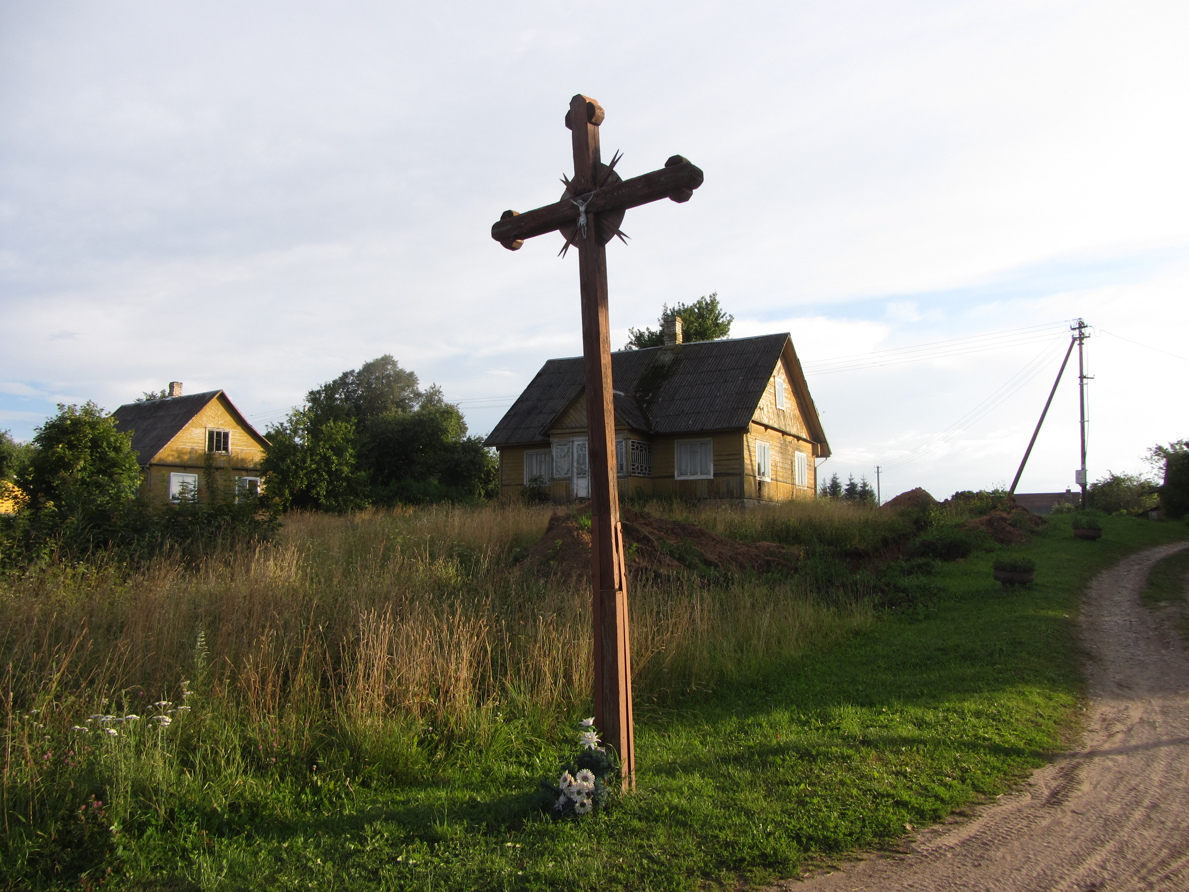 Dubingiai, Lithuania